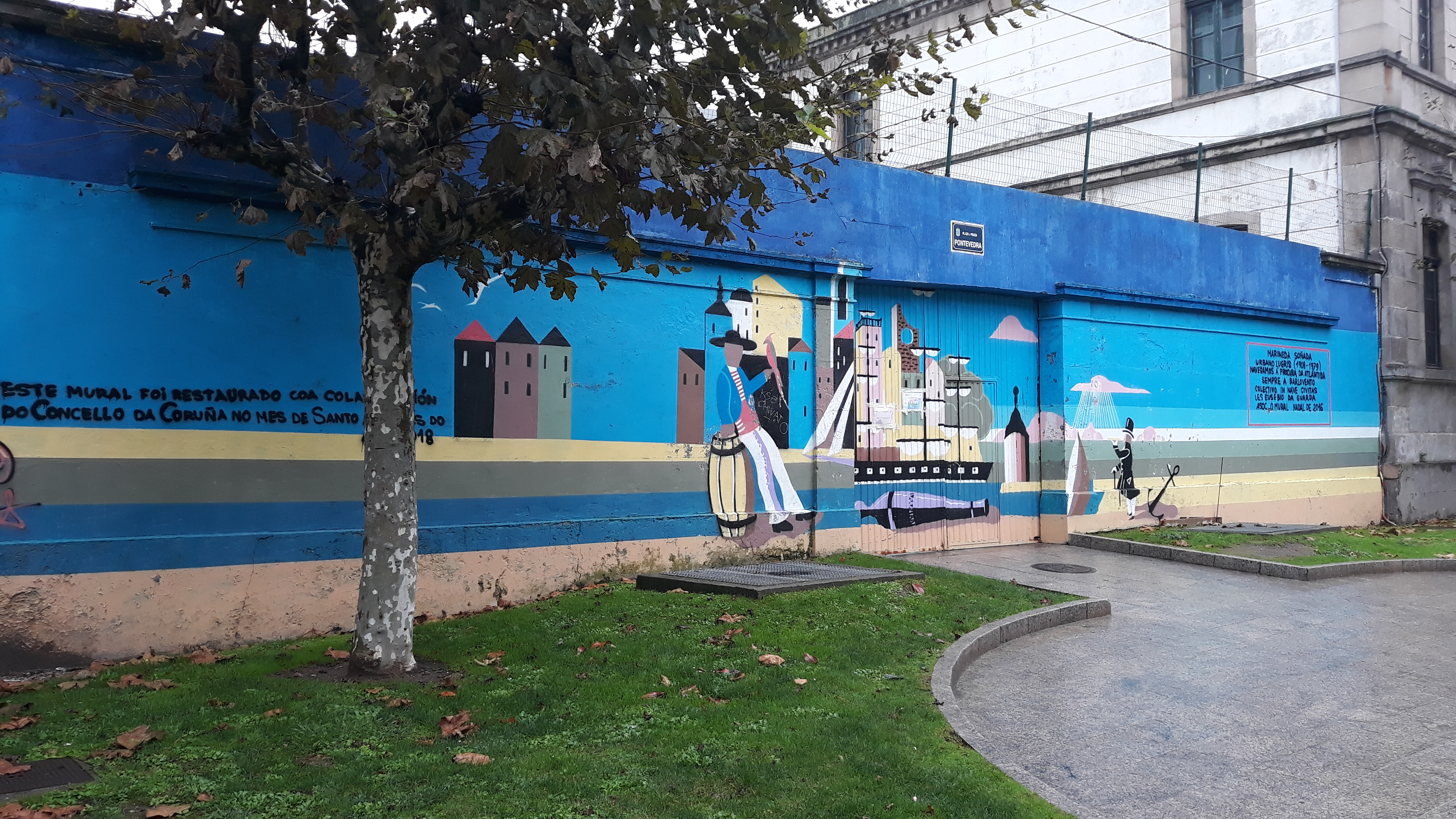 Recreación da obra "Marineda Soñada" de Urbano Lugrís na praza de Pontevedra da Coruña. O mural foi realizado polo grafiteiro Kse e foi promovida polo Colectivo In nave civitatis e a asociación cultural O Mural.